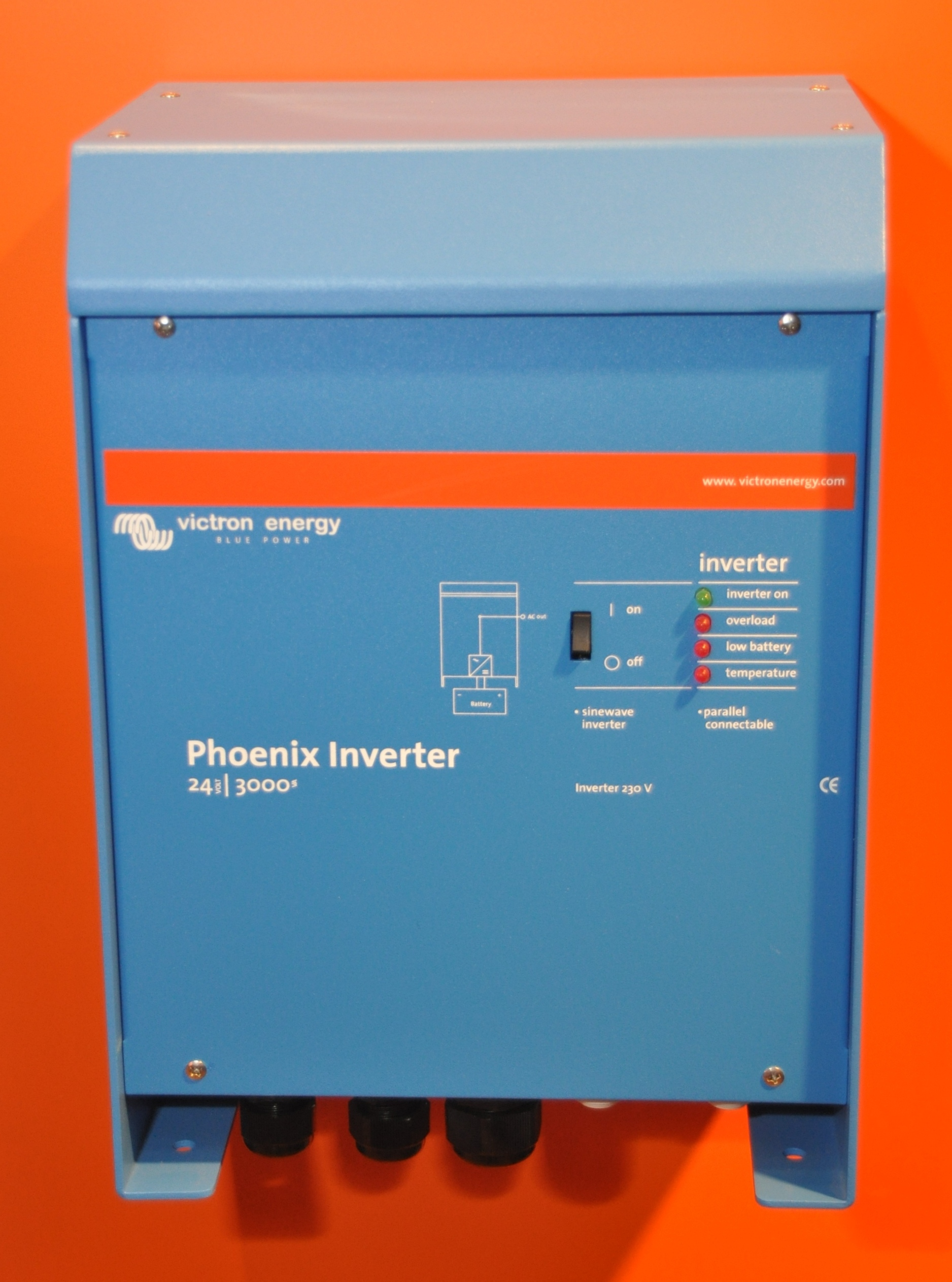 Scheepsmaterialen op de METS 2011 in de RAI te Amsterdam